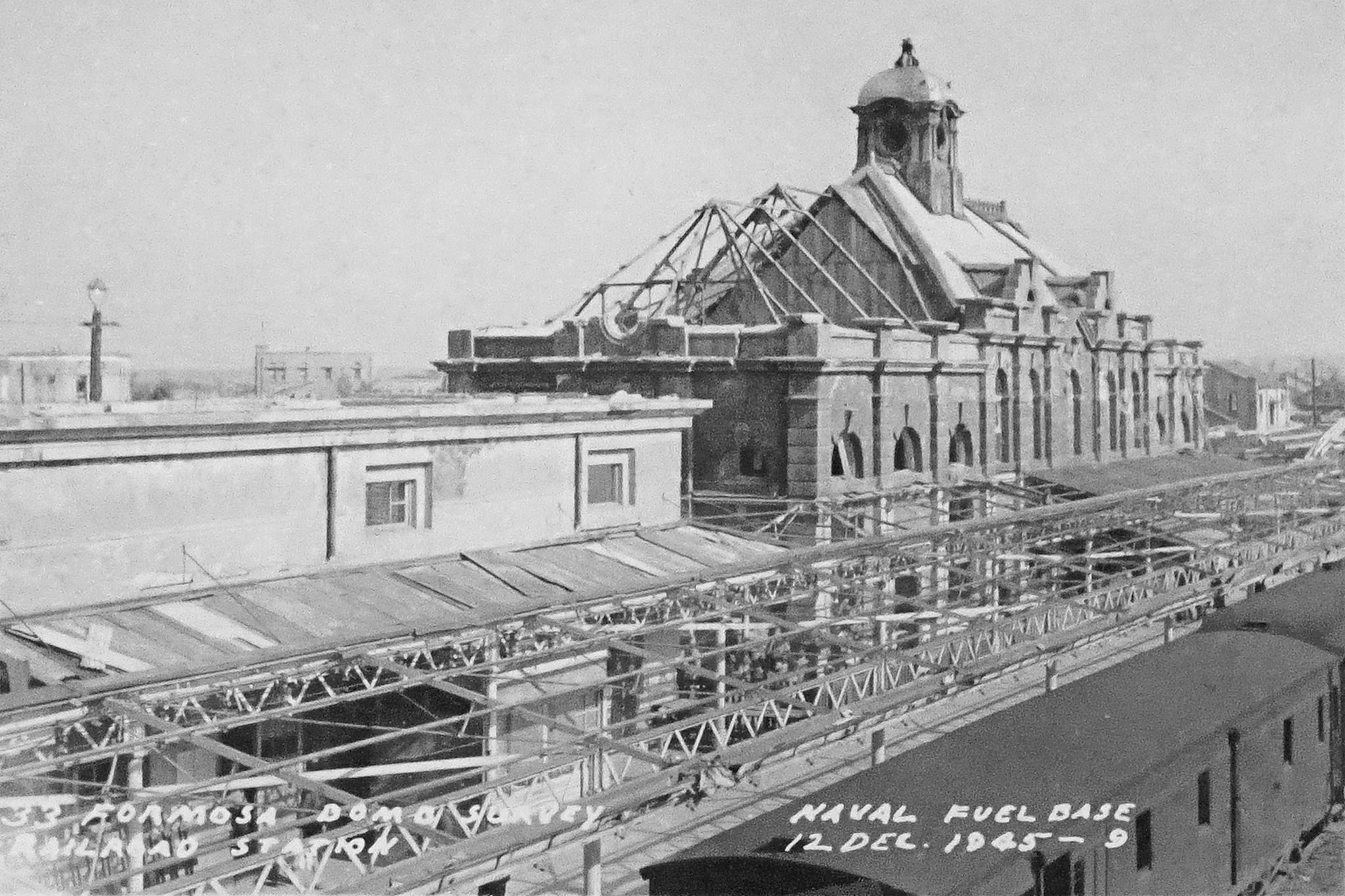 在新竹空襲後受損的新竹車站。